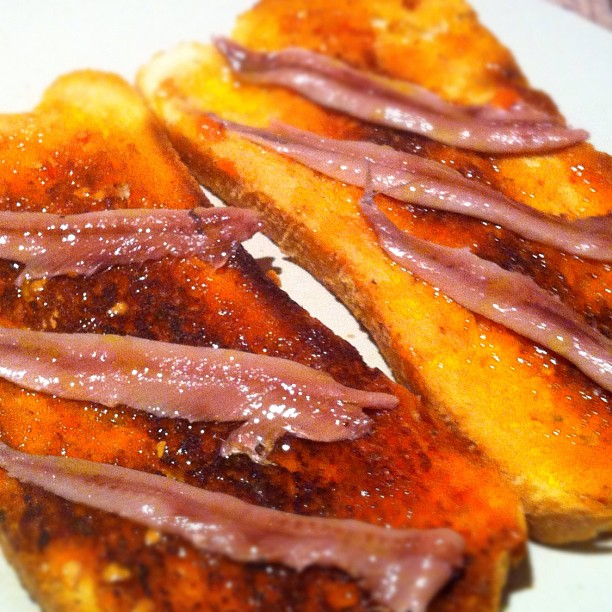 Anxoves i pa amb tomata